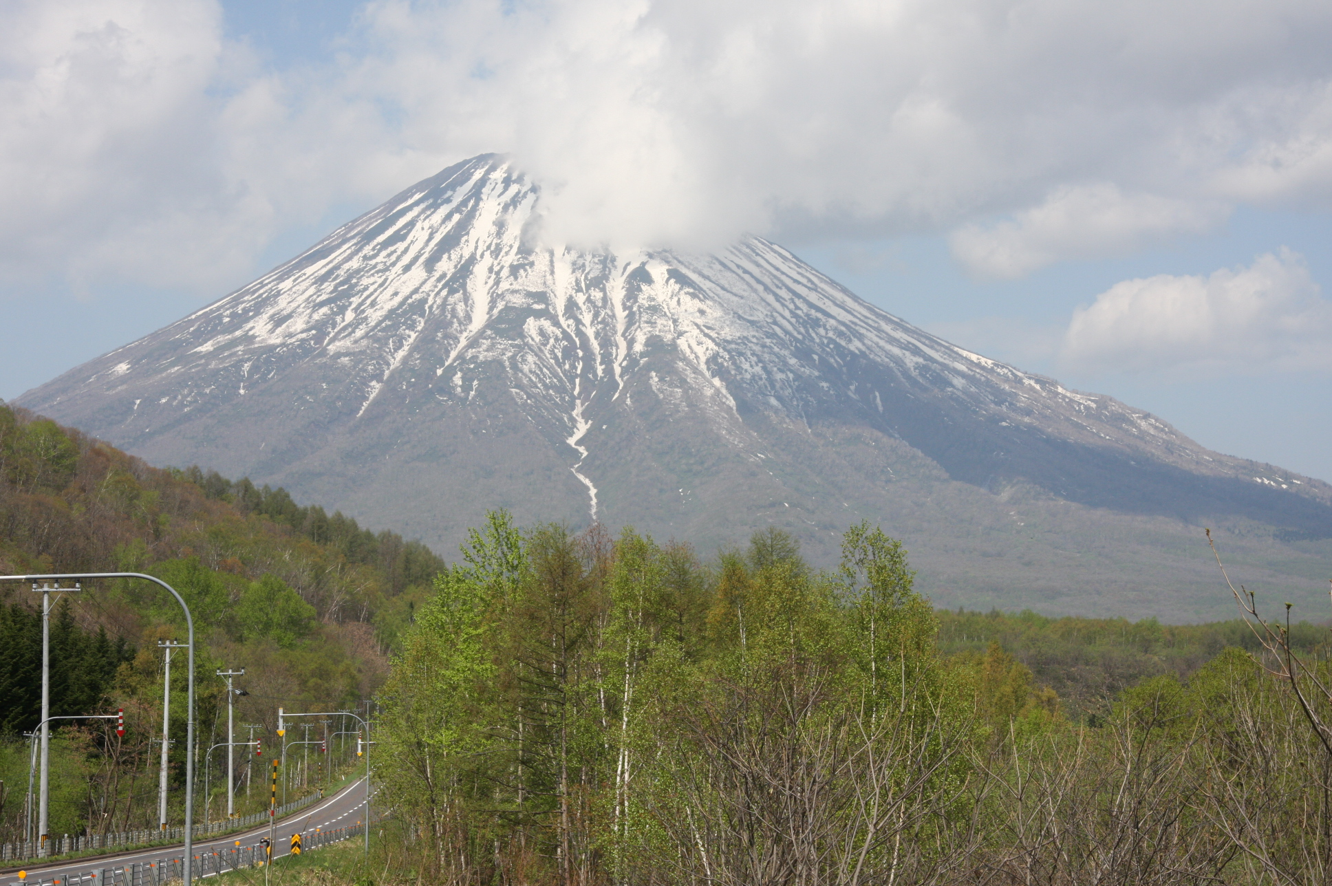 喜茂別町から望む羊蹄山